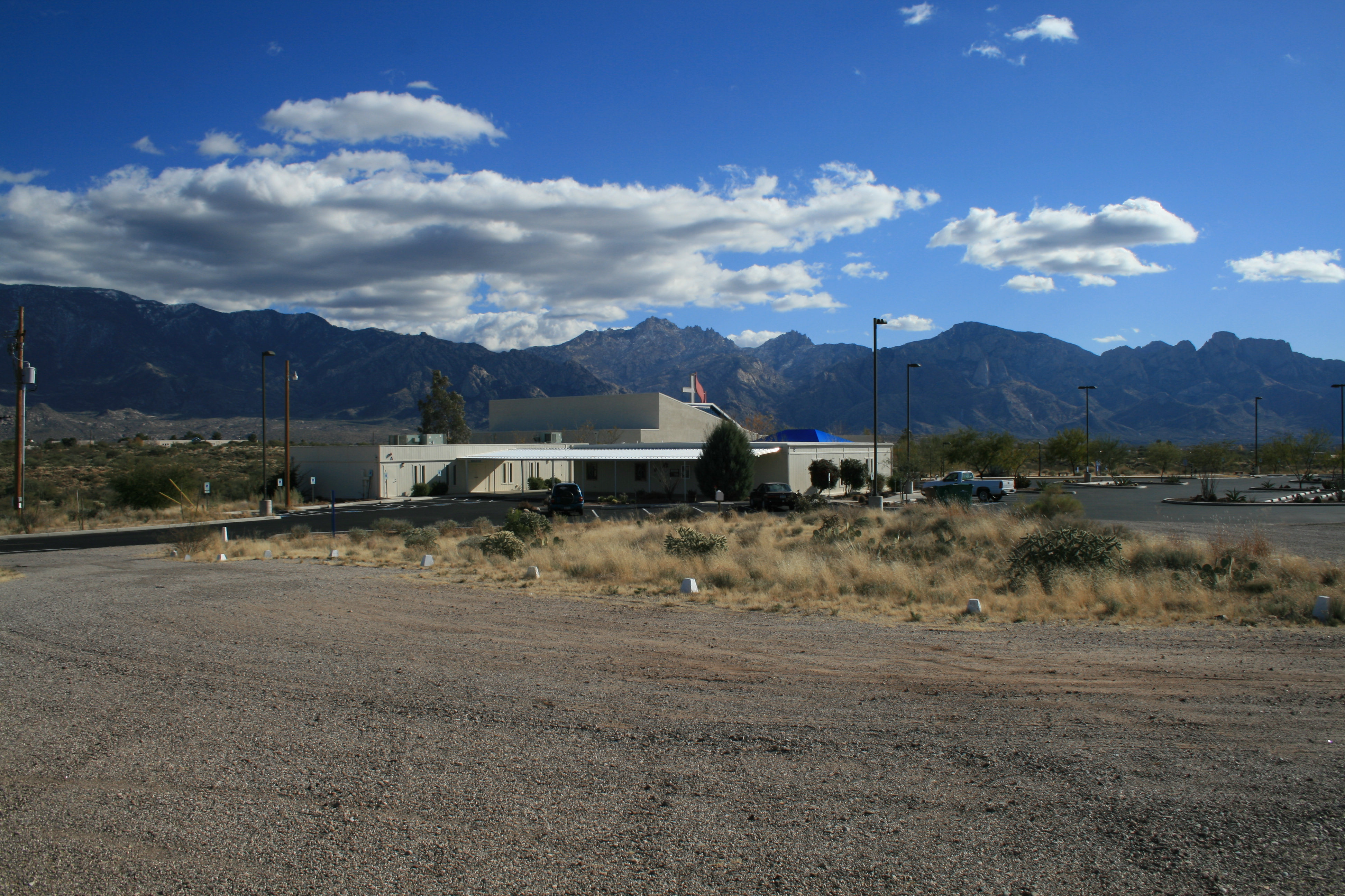 Titan Missile Silo #570-9